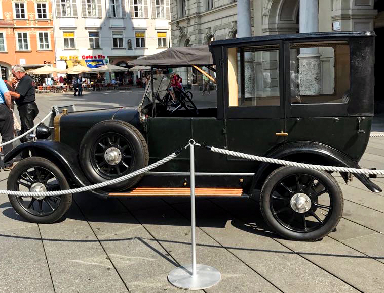 Der D&U-Wagen von Rudolf Ditmar und Otto Urban bei einer Ausstellung am Grazer Hauptplatz